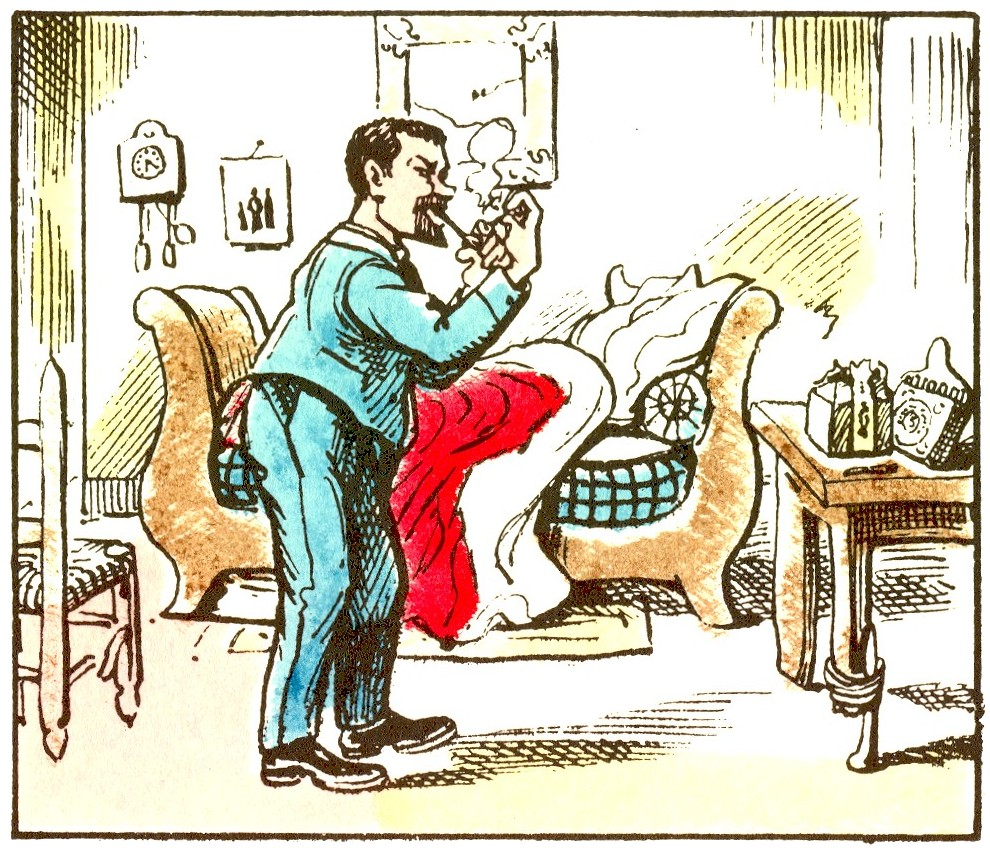 Images d'Épinal : La Journée du prolétaire